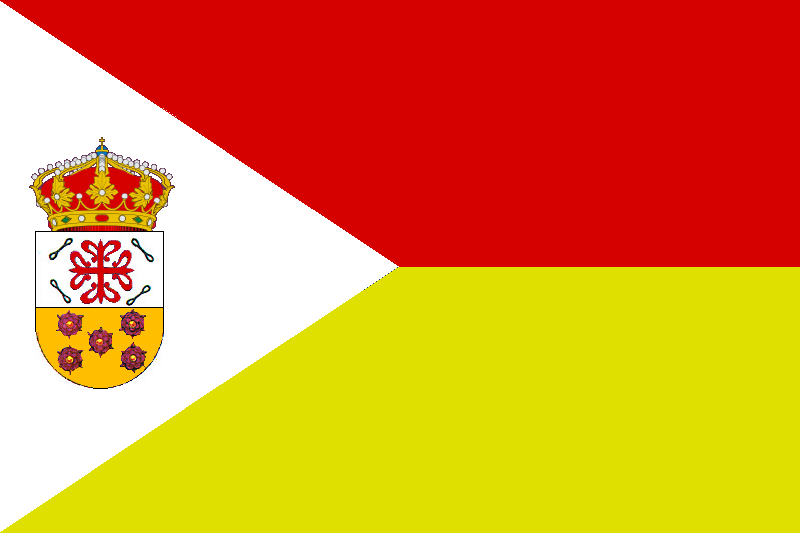 Bandera de Huerta de Valdecarábanos (Toledo)